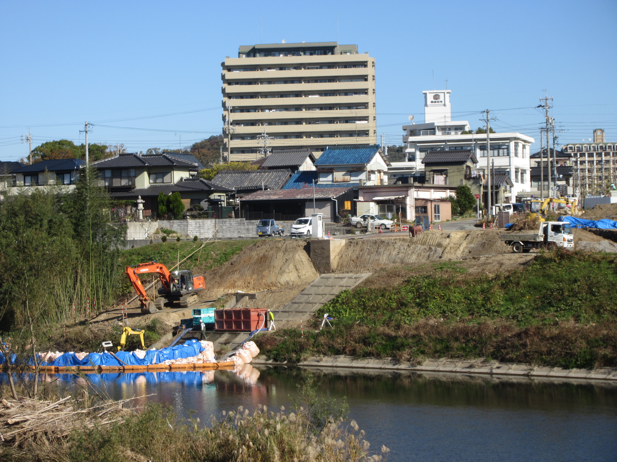 岡崎市の乙川。明大寺町字河原（左岸）から朝日町（右岸）を望む。ここに都市計画道路岡崎環状線の新しい橋が架かる予定。工事現場奥に見える白い建物は岡崎年金事務所。